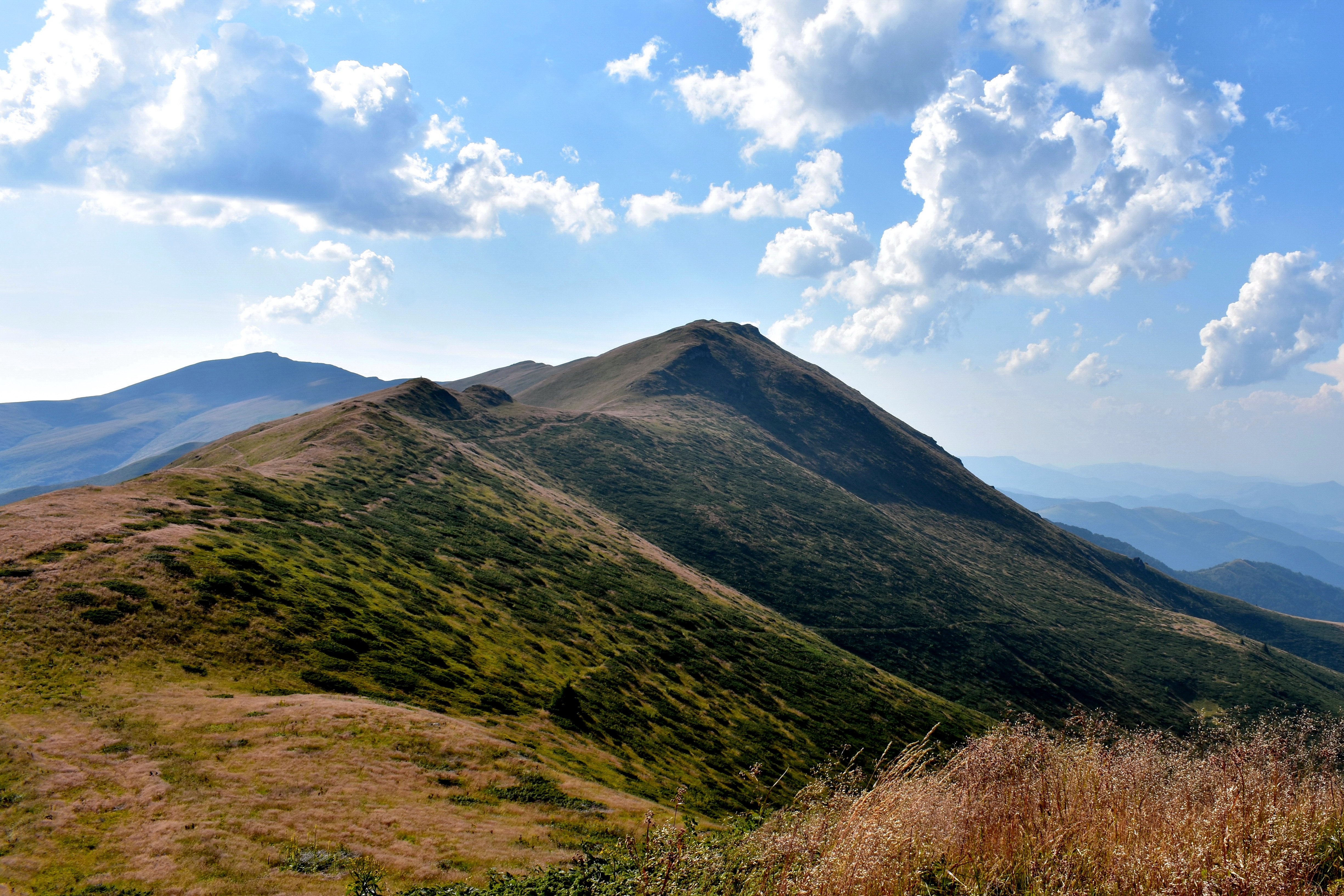 връх Мартинова чука (2026 м), Чипровска планина